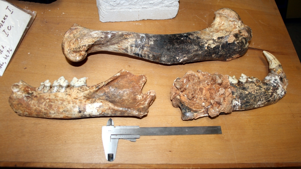 donje čeljusti i kost nadlaktice špiljskog lava (Panthera spelaea), pronađene u jami Vrtare male u Dramlju, Hrvatska